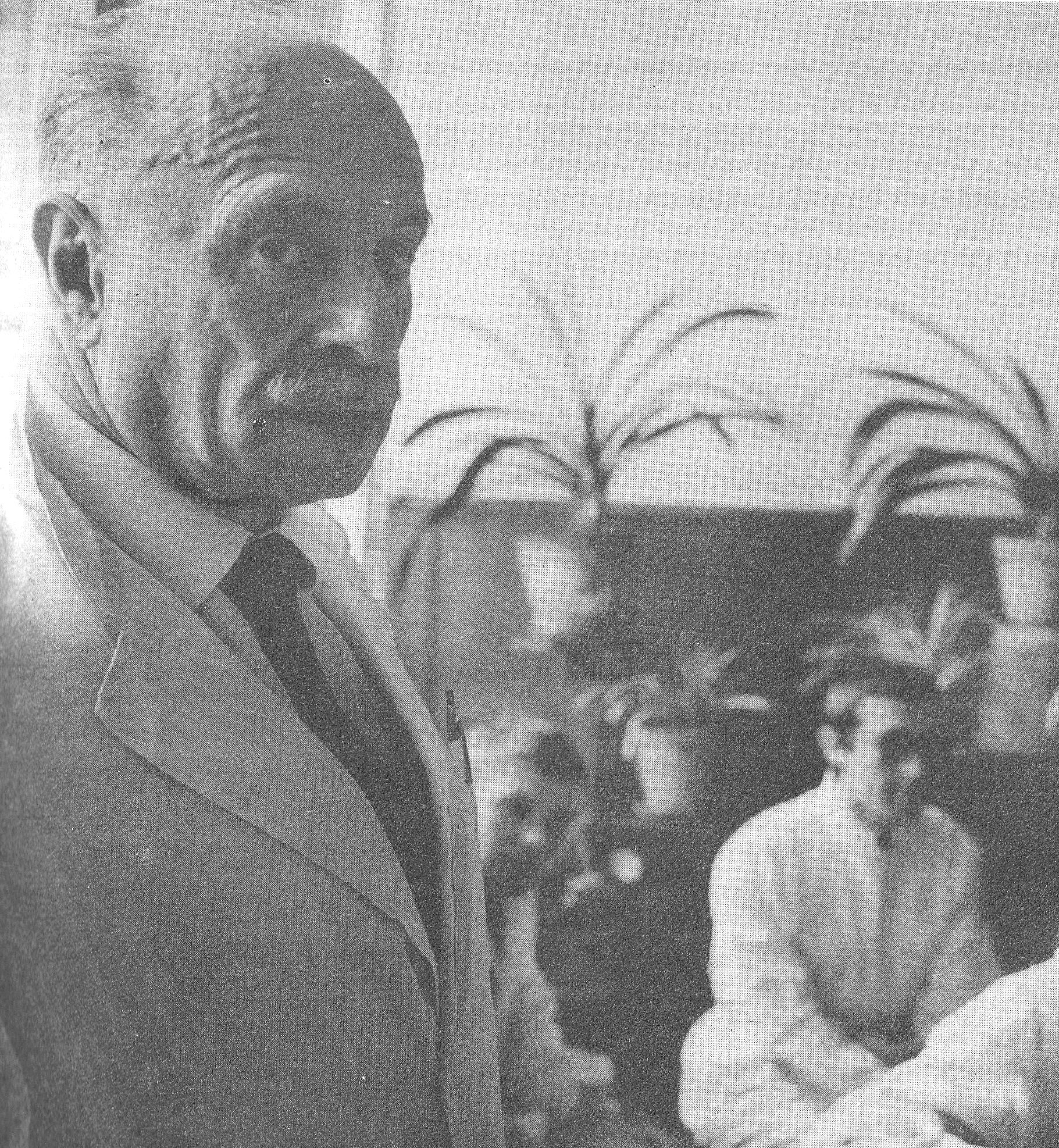 Profesor Julian Aleksandrowicz